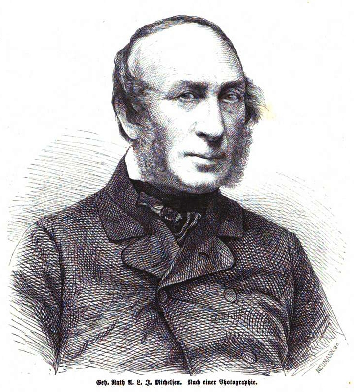 Andreas Ludwig Jakob Michelsen, 1864, Direktor des Germanischen Museums in Nürnberg.